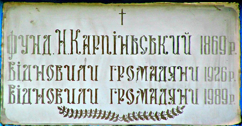 Шманьківці